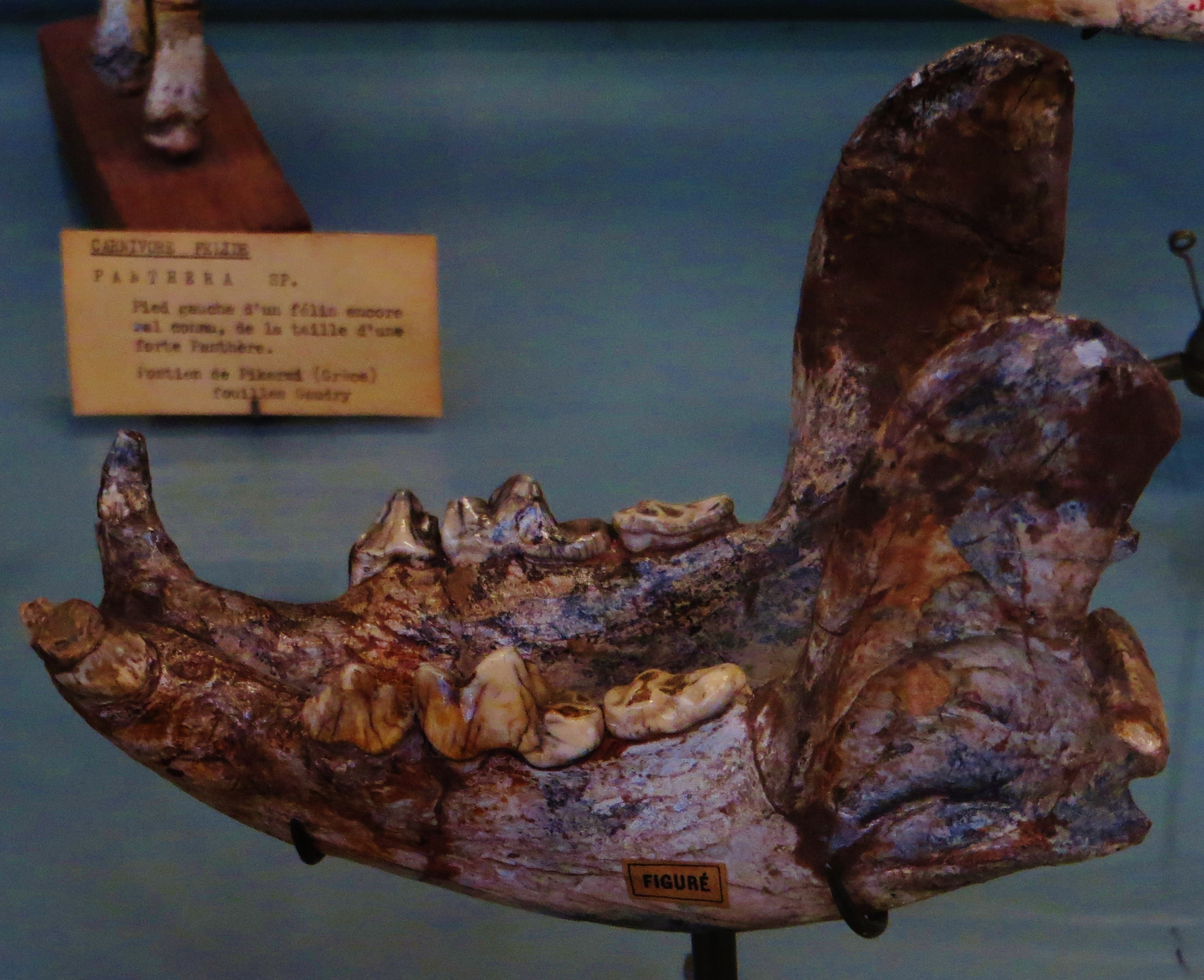 Fossil of Simocyon, an extinct mammal - Took the photo at Musee d'Histoire Naturelle, Paris